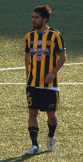 cropped image of a creative common image of Marco sau